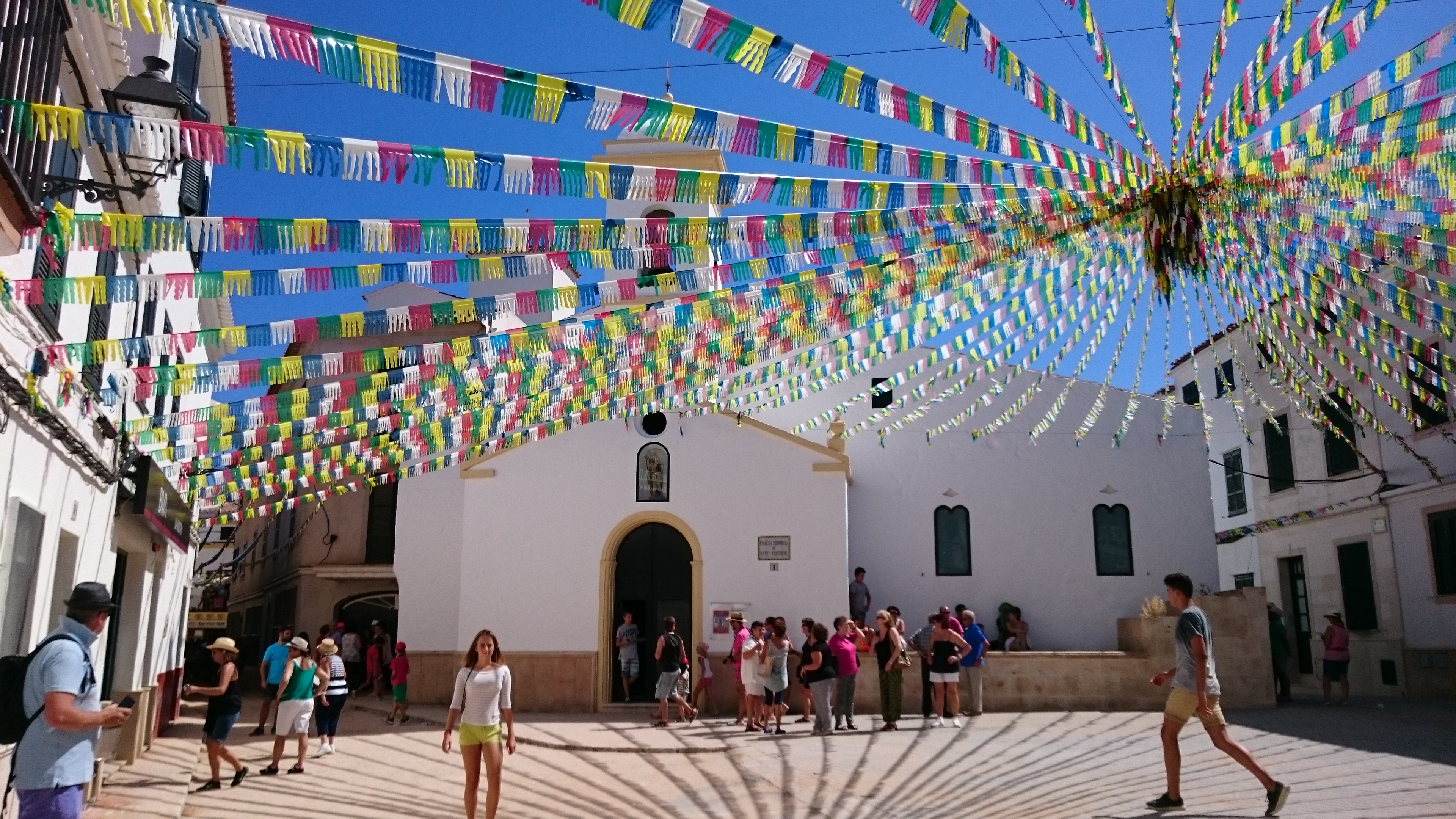 Festes des Migjorn Gran, en honor a sant Cristòfol de ses Corregudes This is a photography of a Folklore festival in Spain (Wikidata id Q23662660).